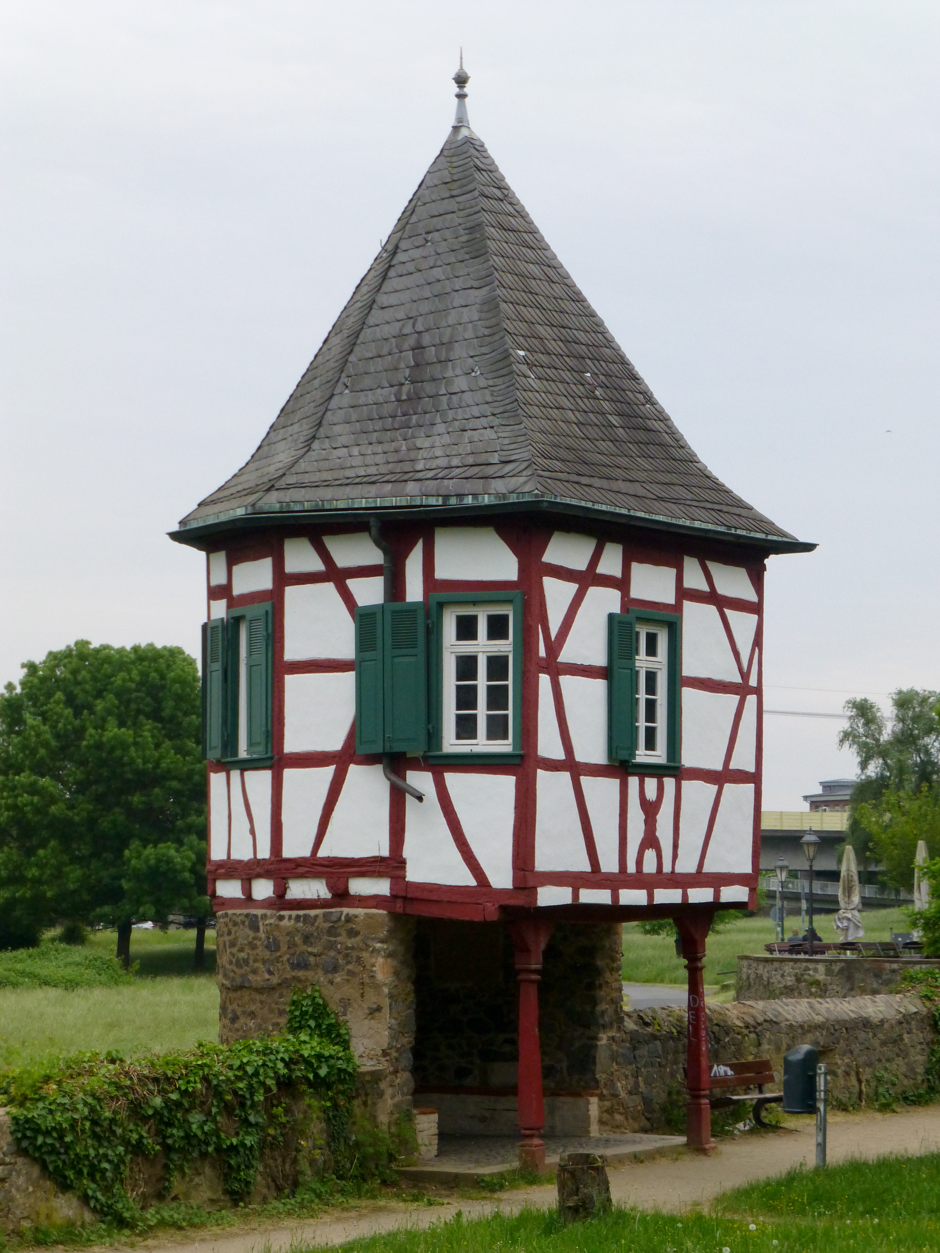 Schloss Steinheim; der sogenannte Weiße Turm an der unteren Grenzmauer des Schlossgartens